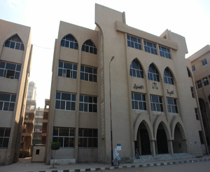 المبني الملحق لكلية الحقوق جامعة الزقازيق بميدان الزراعه